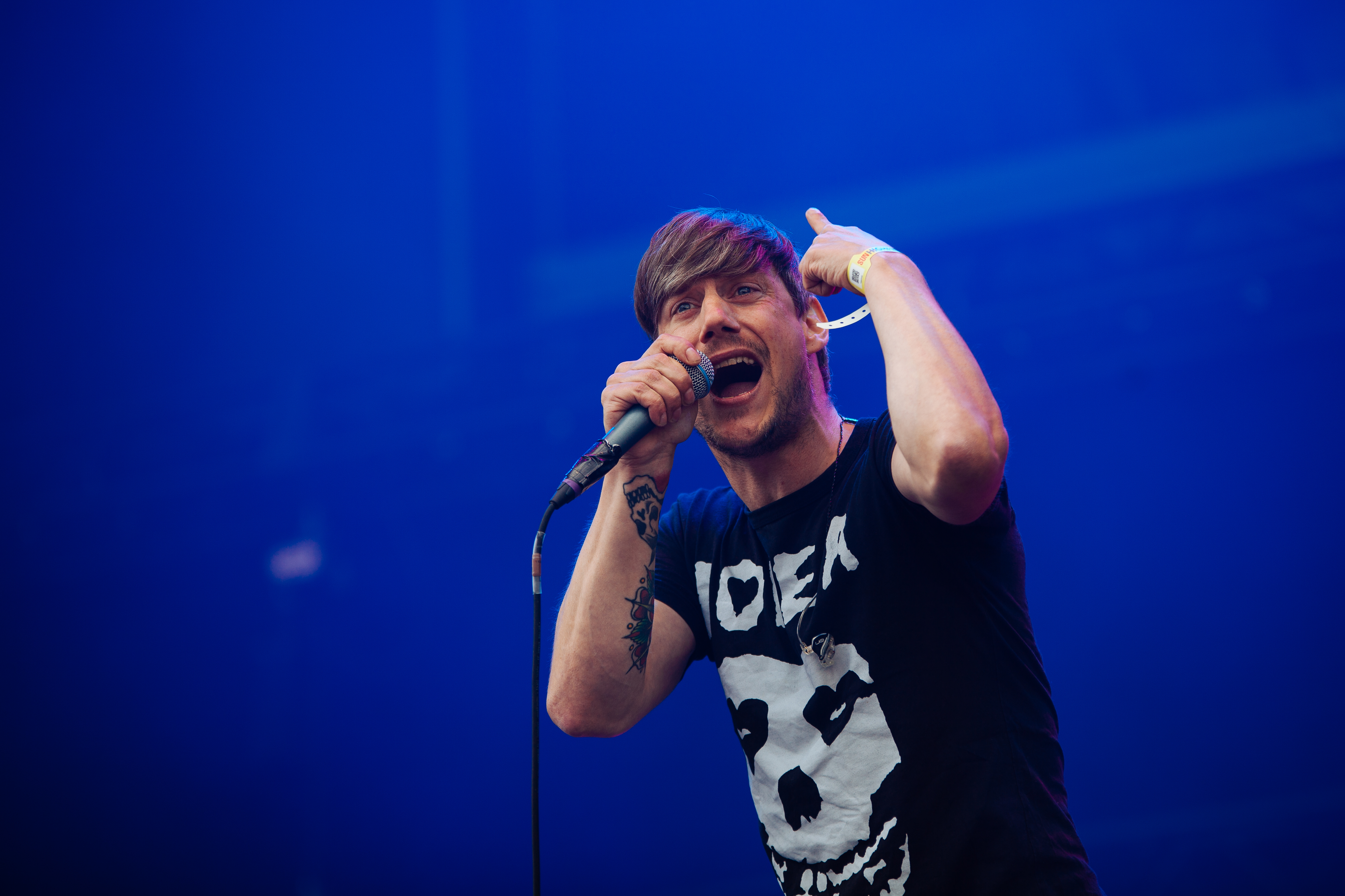 Jan Windmeier von Turbostaat